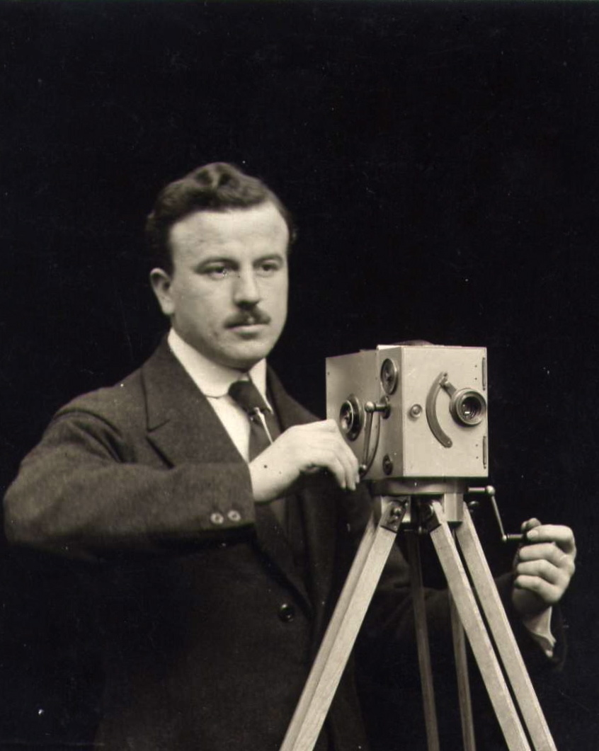 Attilio Prevost, autoritratto 1913